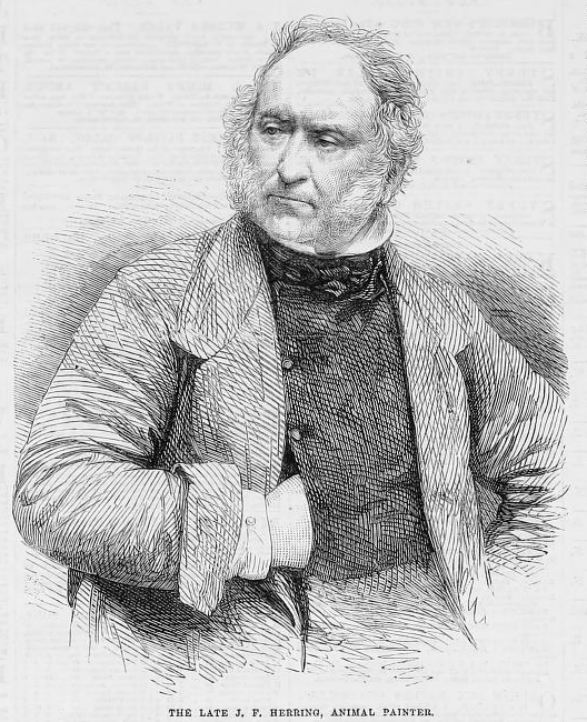 John Frederick Herring, Sr. (12 September 1795 – 23 September 1865)